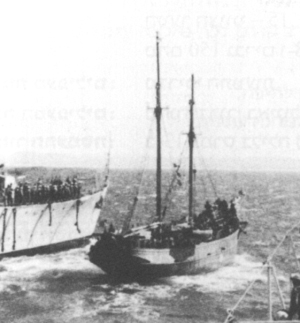 אוניית המעפילים אורד וינגייט